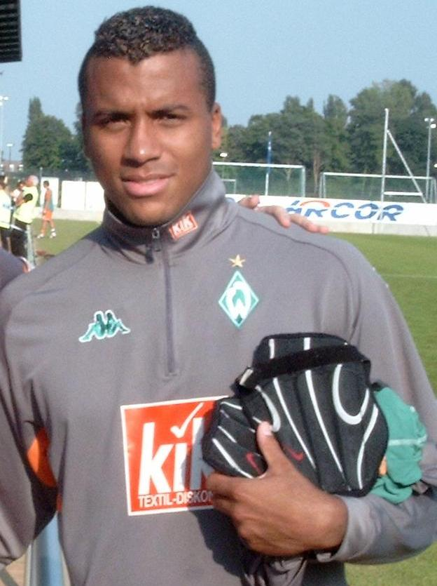 Francis Banecki, nach einem Regionalligaspiel